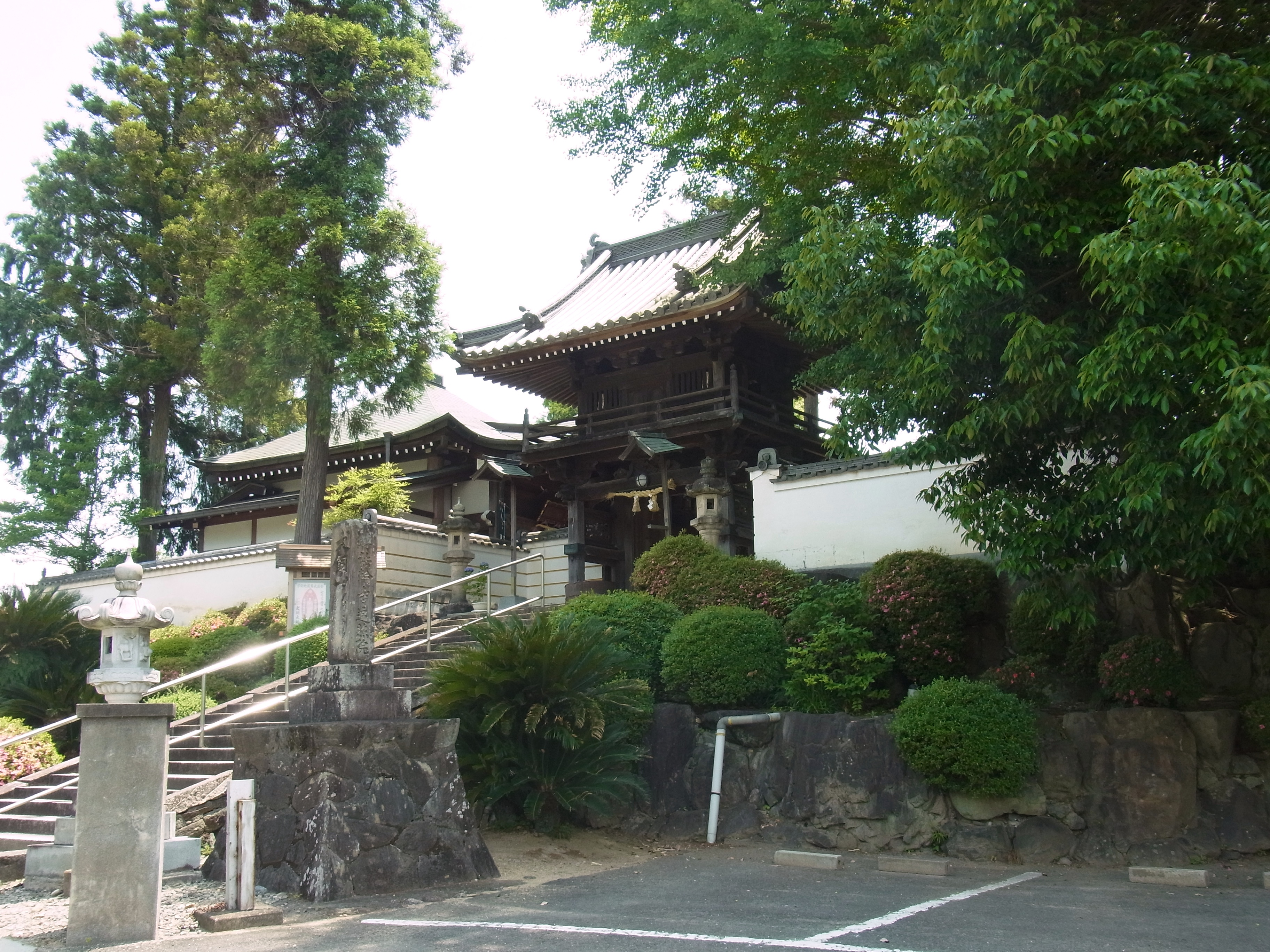 轉法輪寺の山門 五條市犬飼町 Tempōrinji 2012.6.11